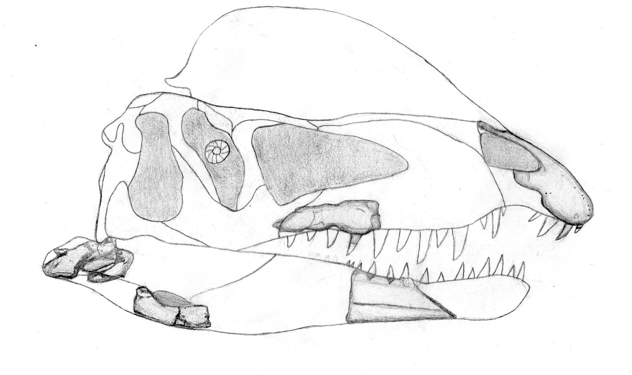 Restauración del cráneo basado en Dilophosaurus con el holotipo.